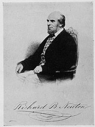 Richard Blake Newton (1801-1868) terrateniente inglés